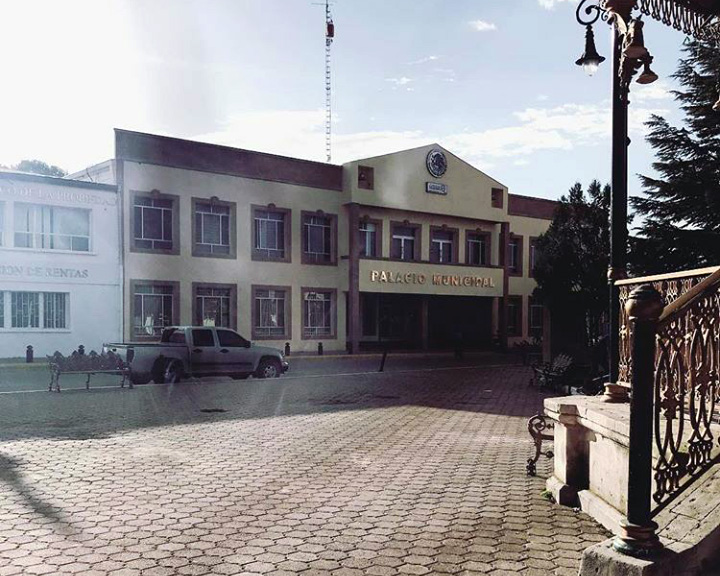 Presidencia Municipal, Vicente Guerrero, Chihuahua.